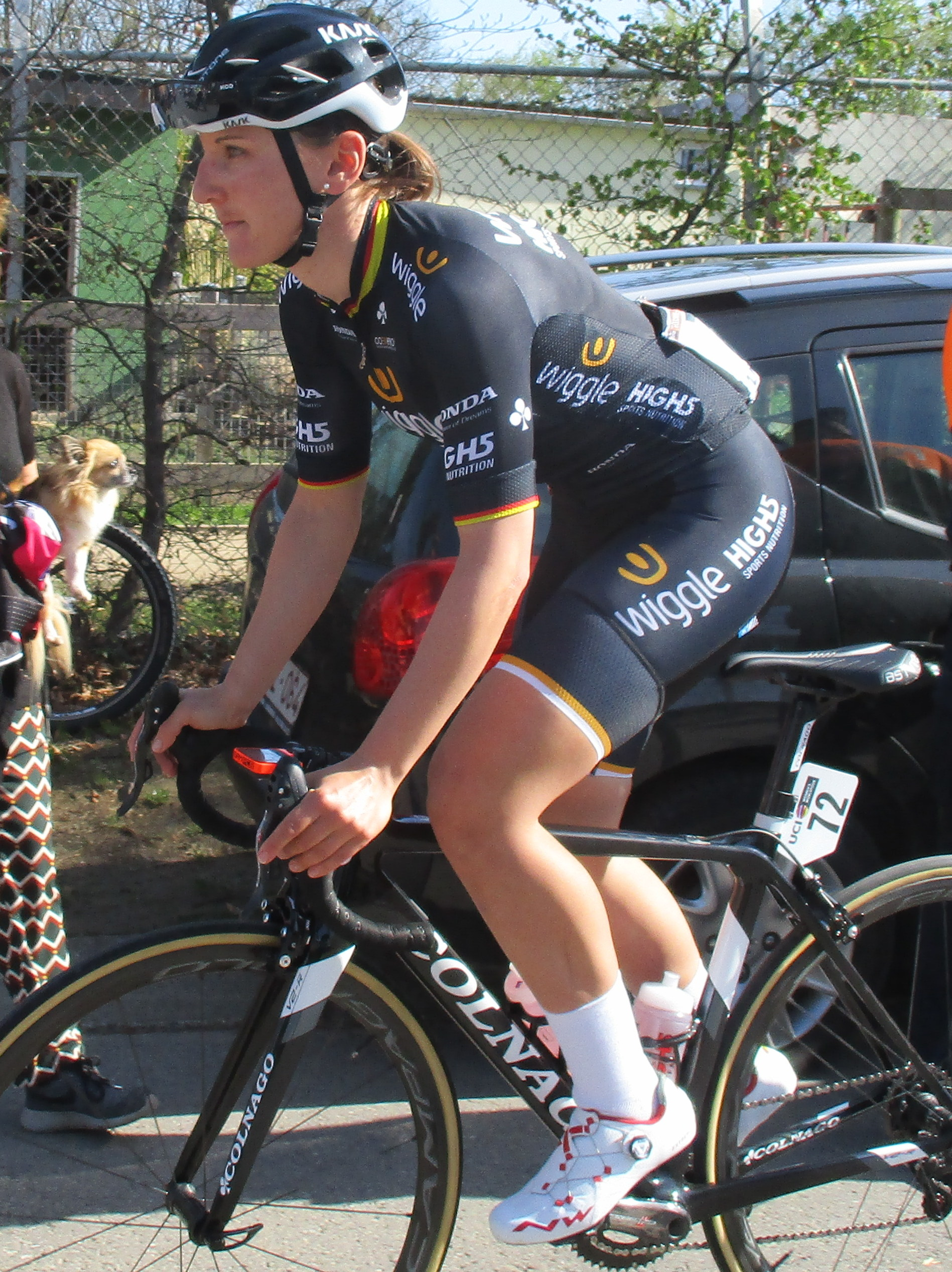 Start van de Waalse Pijl 2018 op de Mur van Huy.